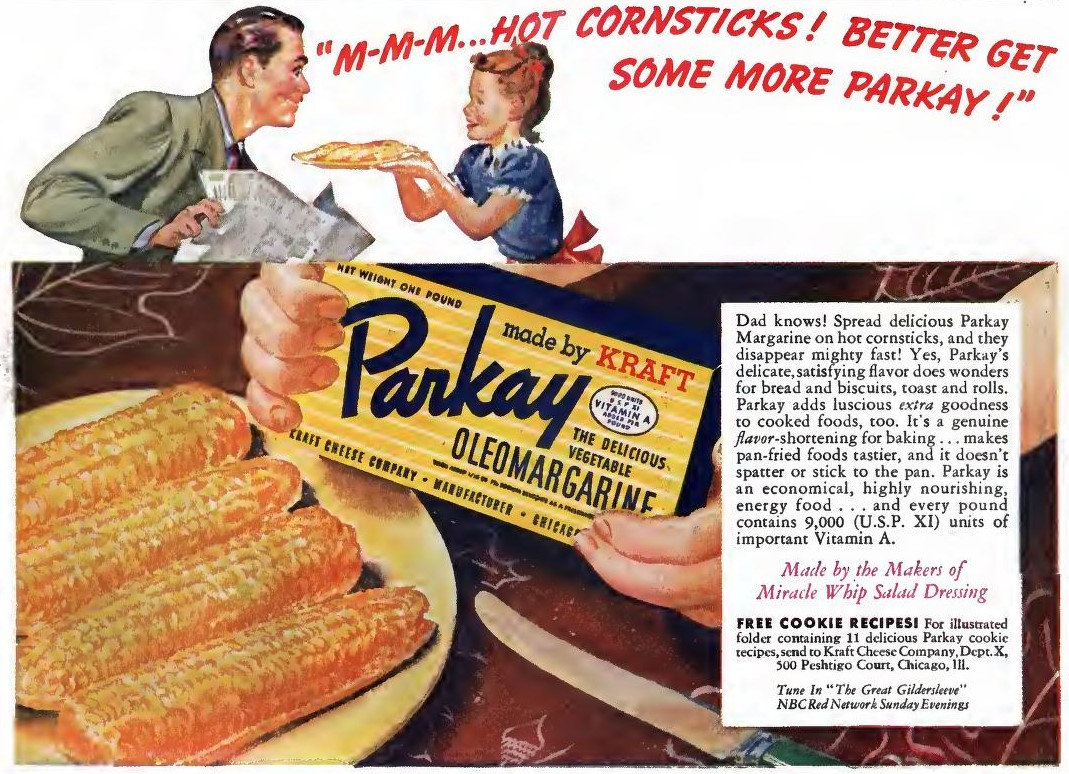 Better get some more Parkay!, 1942